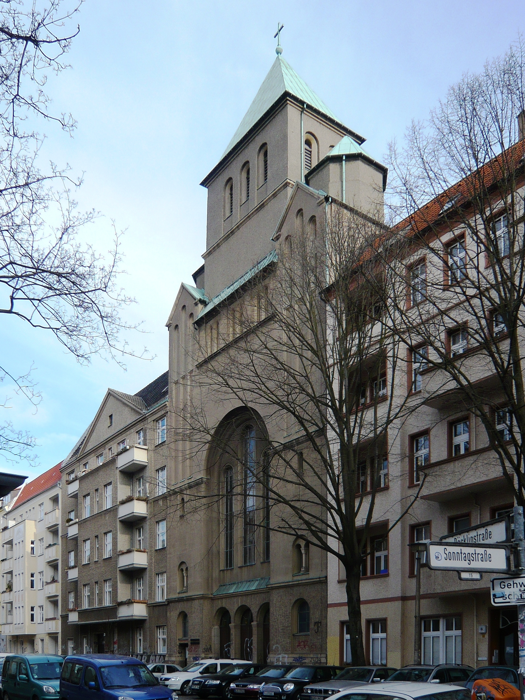 Friedrichshain: Böcklinstraße, Kirche